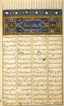 სპარსული ხელნაწერი ხელნაწერთა ეროვნული ცენტრის აღმოსავლურ ხელნაწერთა ფონდიდან